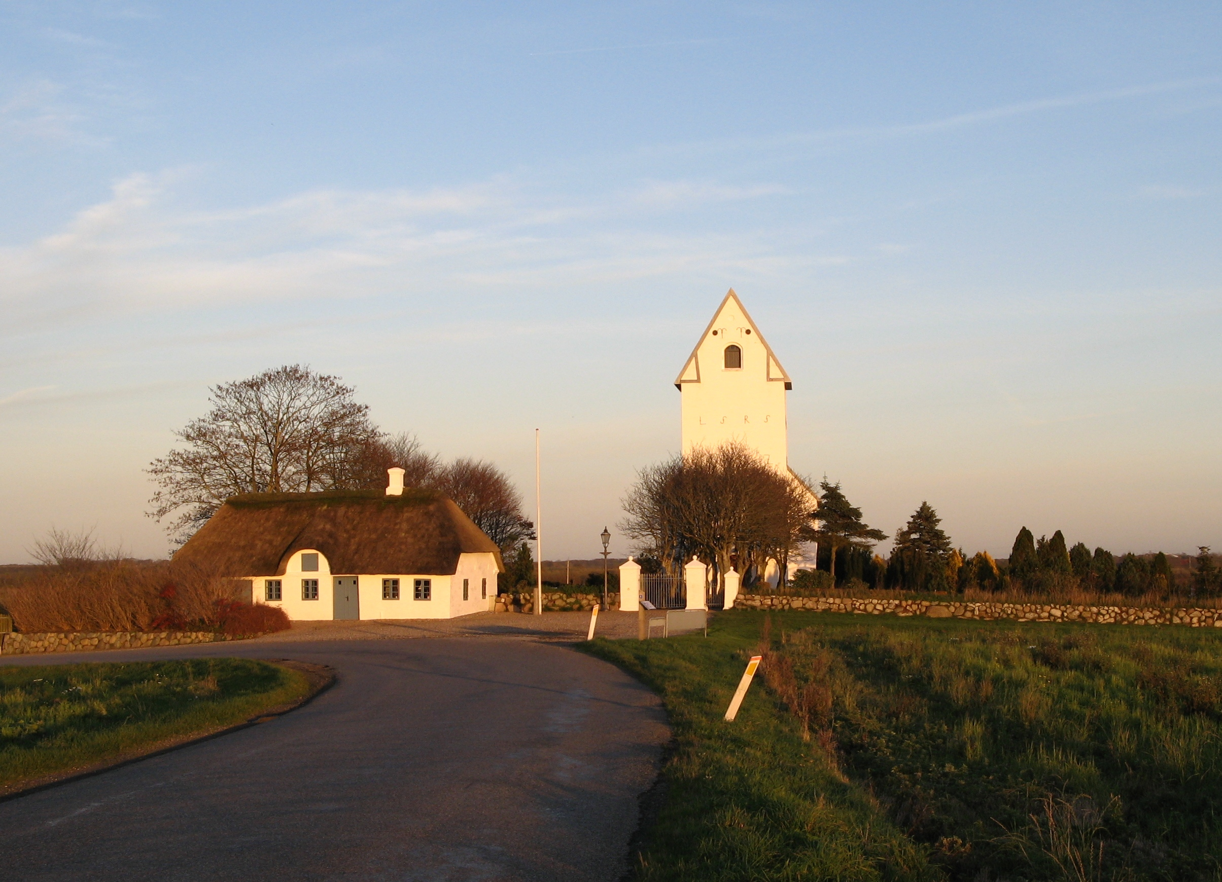 Sneum kirke, Sneum sogn, Esbjerg kommune (former: Skads Herred, Ribe Amt).